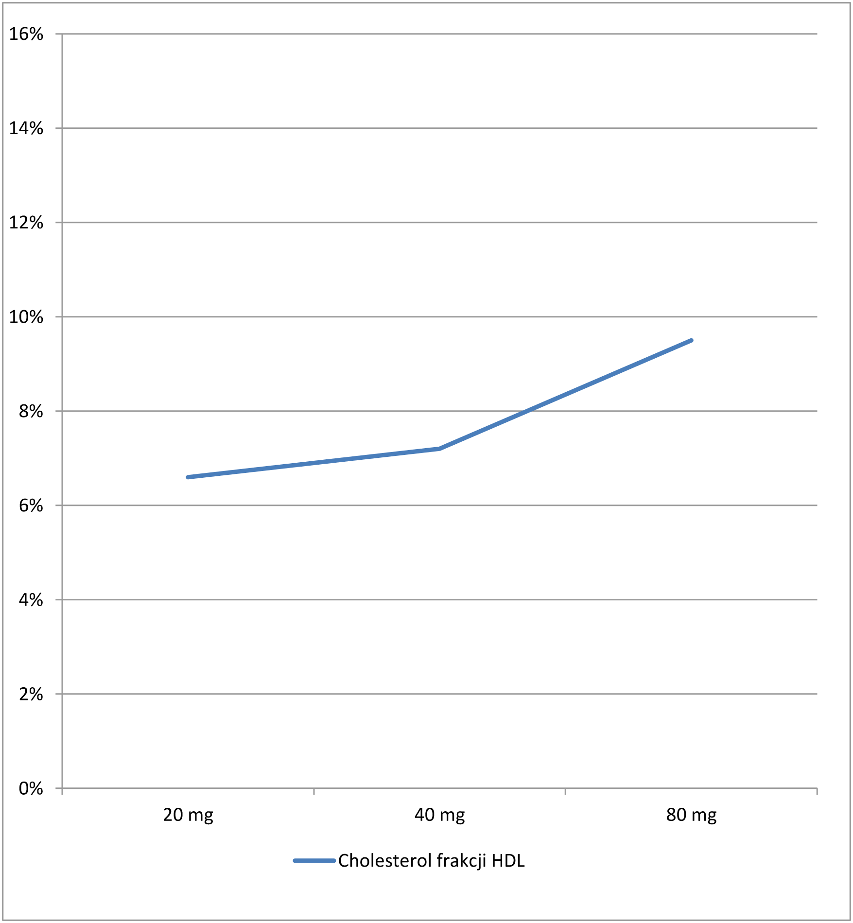 Wpływ lowastatyny na wskaźniki lipidowe (dane do wykresu za [ TABLETS ® MEVACOR (LOVASTATIN)])